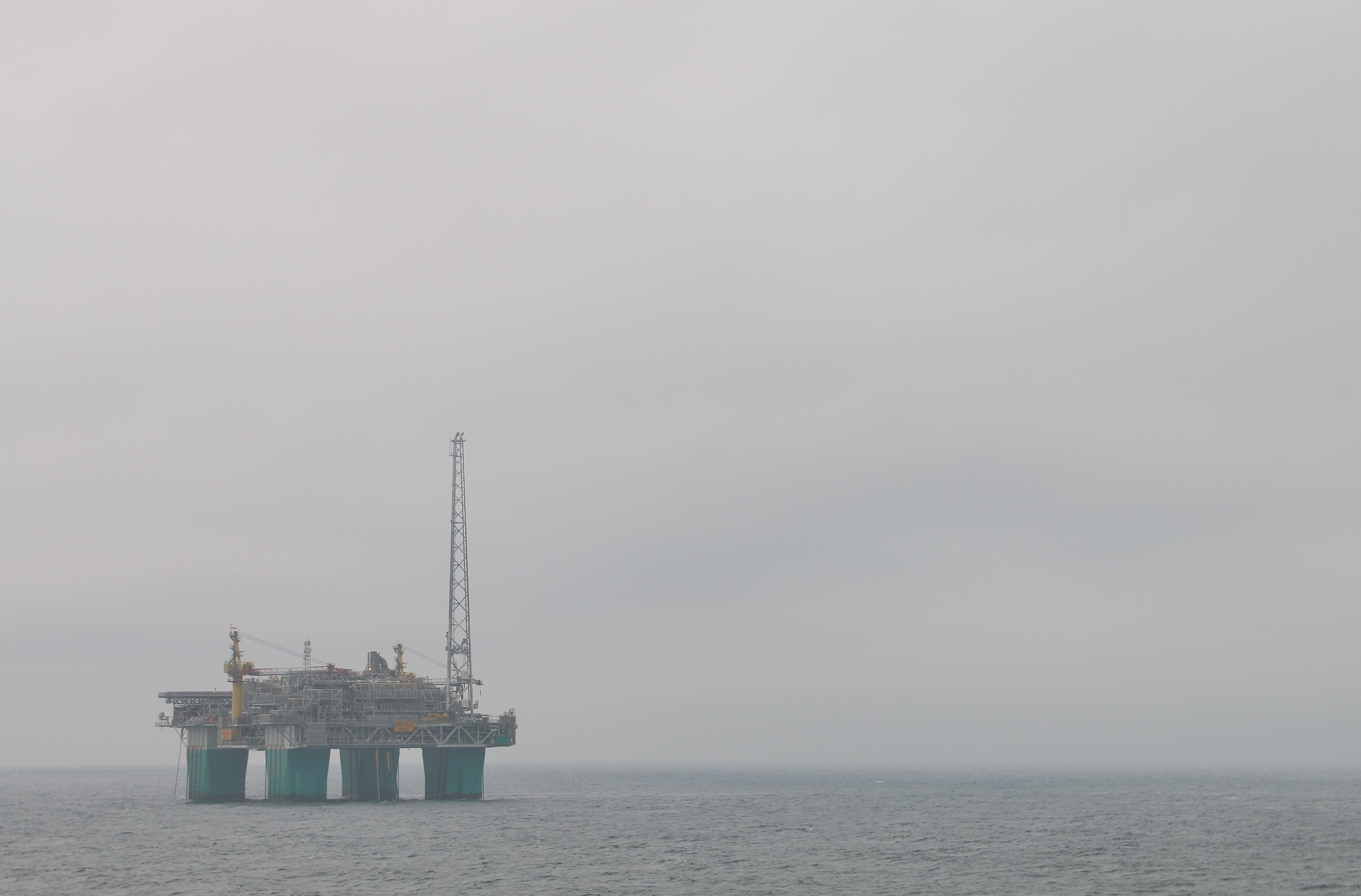 Gjøa-feltet ble oppdaget i 1989 av Statoil. Da feltet var klart for produksjon i 2010, tok Engie over driften. Foto: Øyvind Knoph Askeland, Norsk olje og gass